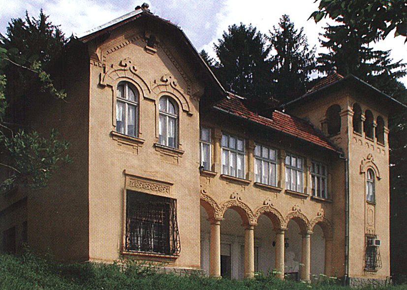 Ciucea castle, Cluj County, Romania